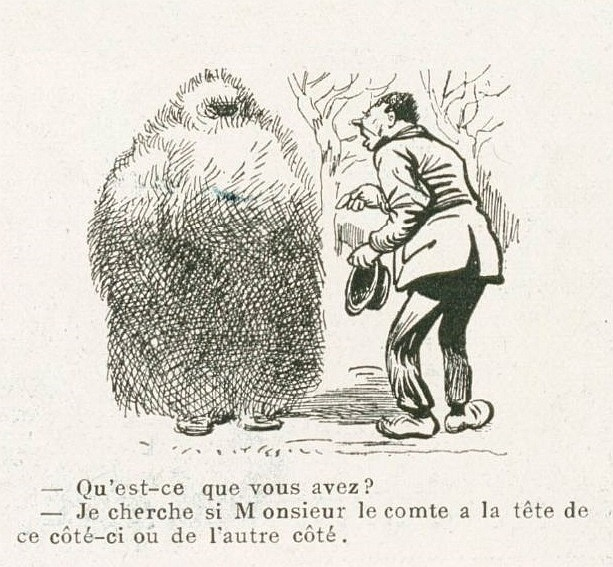 La semaine comique d'Henriot - La Vie au Grand Air du 16 mars 1906, p.II